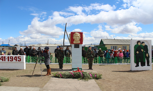 Памятник участника ВОВ, Героя Советского Союза Х.Н. Чургуй-оола находится с.Берт-Даг Тес-Хемского кожууна